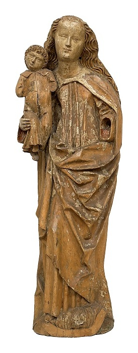 Assumpta s Ježíškem z kostela sv. Jošta v Chebu (kolem r. 1500)